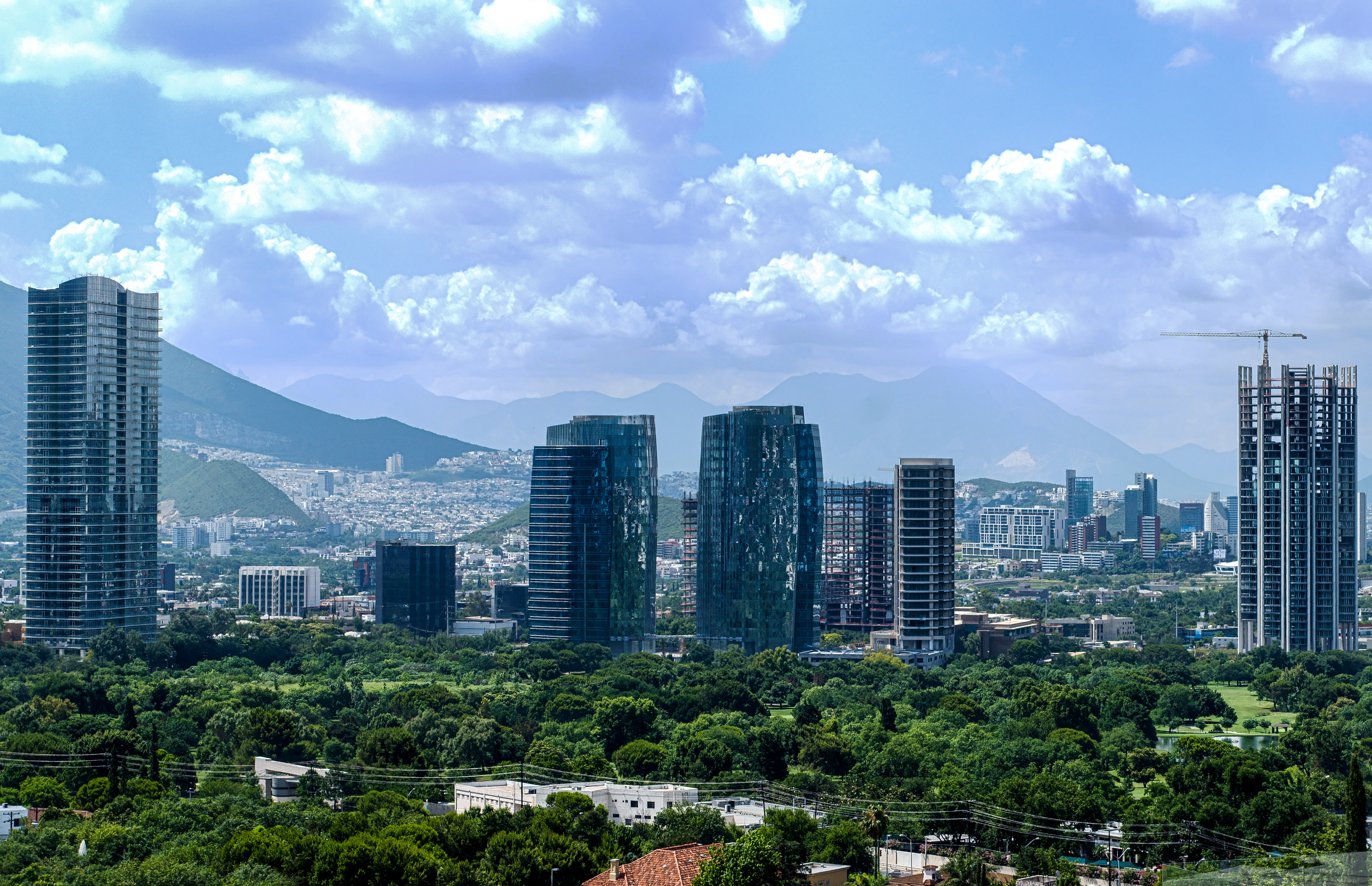 Campestre de Monterrey.